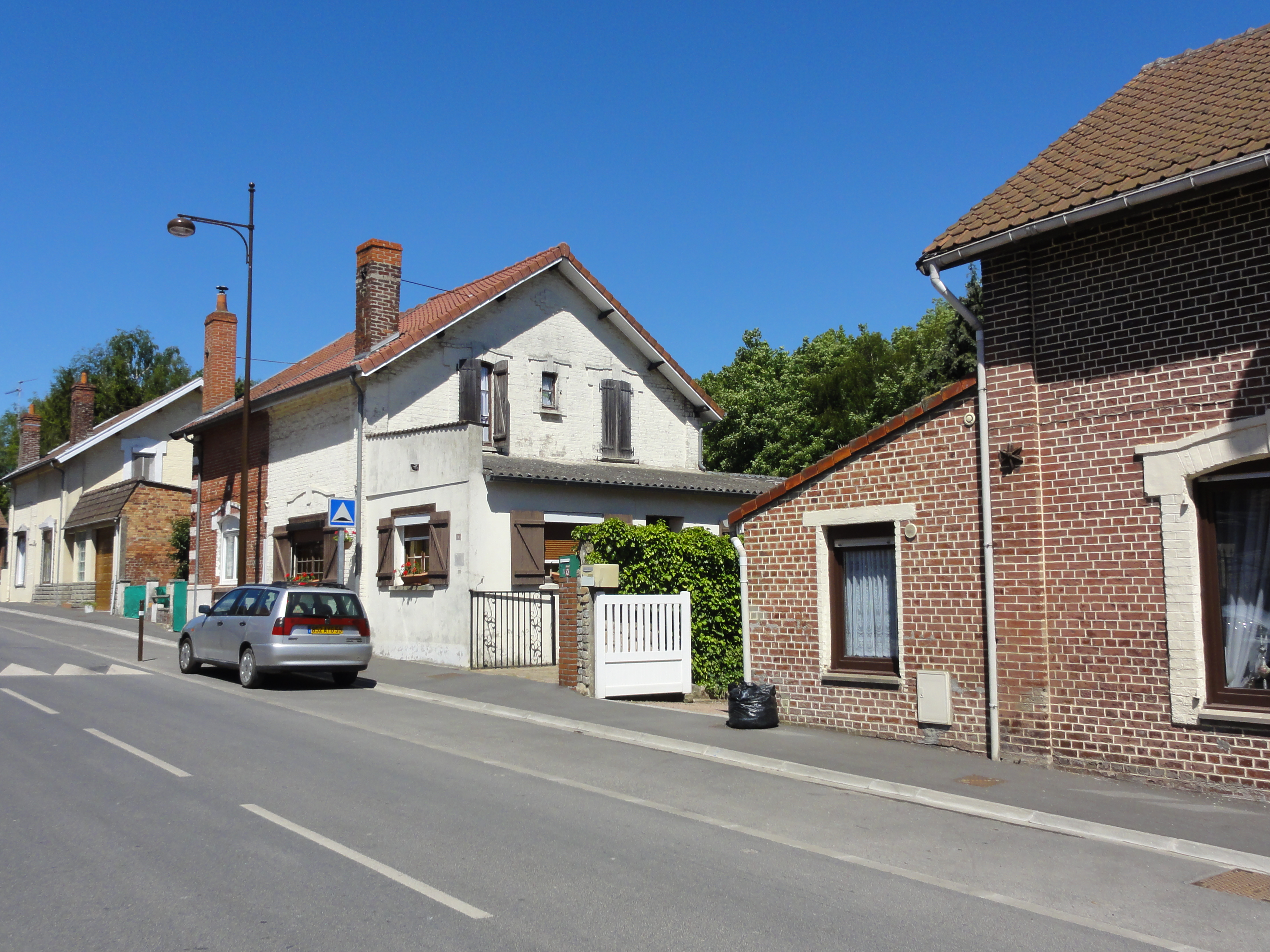 Cités de la fosse n° 1 - 1 bis de la Compagnie des mines de Gouy-Servins et Fresnicourt Réunis dans le bassin minier du Nord-Pas-de-Calais, Bouvigny-Boyeffles, Pas-de-Calais, Nord-Pas-de-Calais, France.